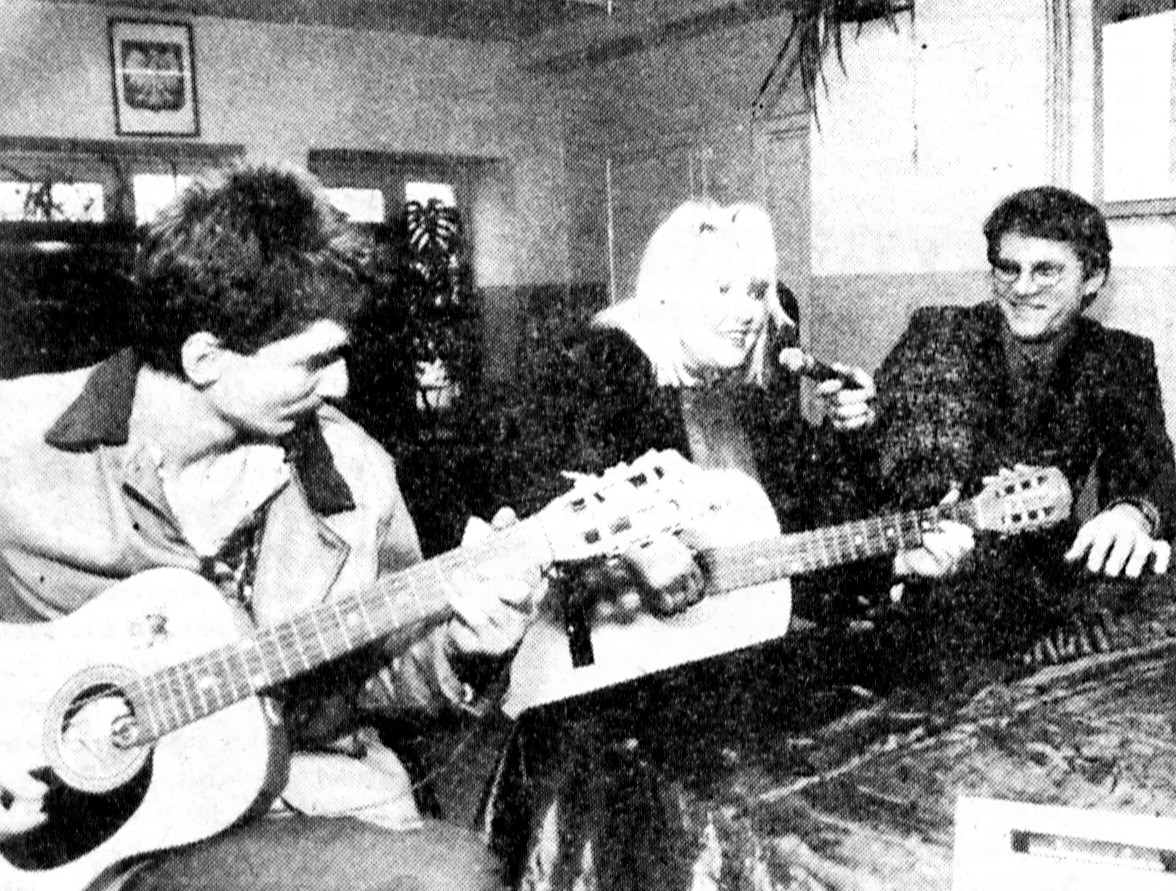 Krzysztof Kolberger (po prawej) i Maryla Rodowicz podczas występu w więzieniu przy ul. Kleczkowskiej we Wrocławiu; akompaniuje jeden z osadzonych